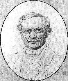 Karl August Koberstein (1797–1870)